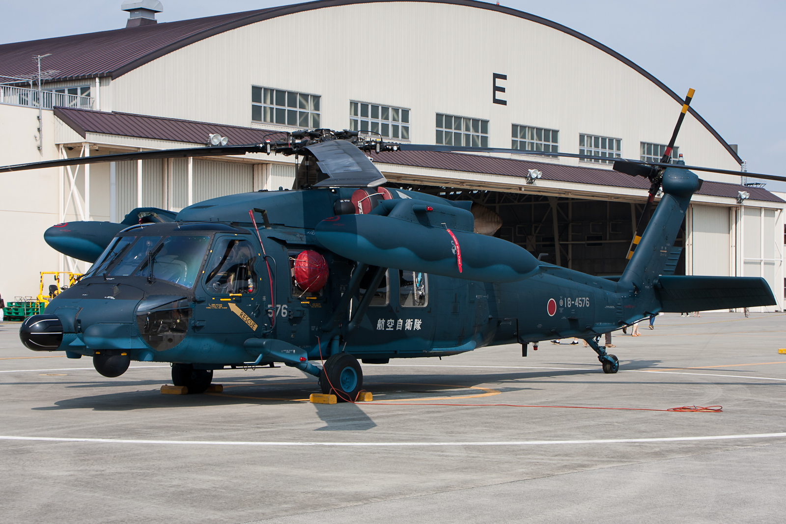 Aircraft: Mitsubishi Heavy Industries, Ltd. UH-60J(sn: 18-4576) Squadron: JASDF Air Rescue Wing / Hyakuri Rescue SQ（航空救難団飛行群 百里救難隊） Base: JASDF Hyakuri AB(RJAH) Ibaraki-ken, Japan 19/09/2010 JGSDF Camp Tachikawa(RJTC) Tokyo, Japan